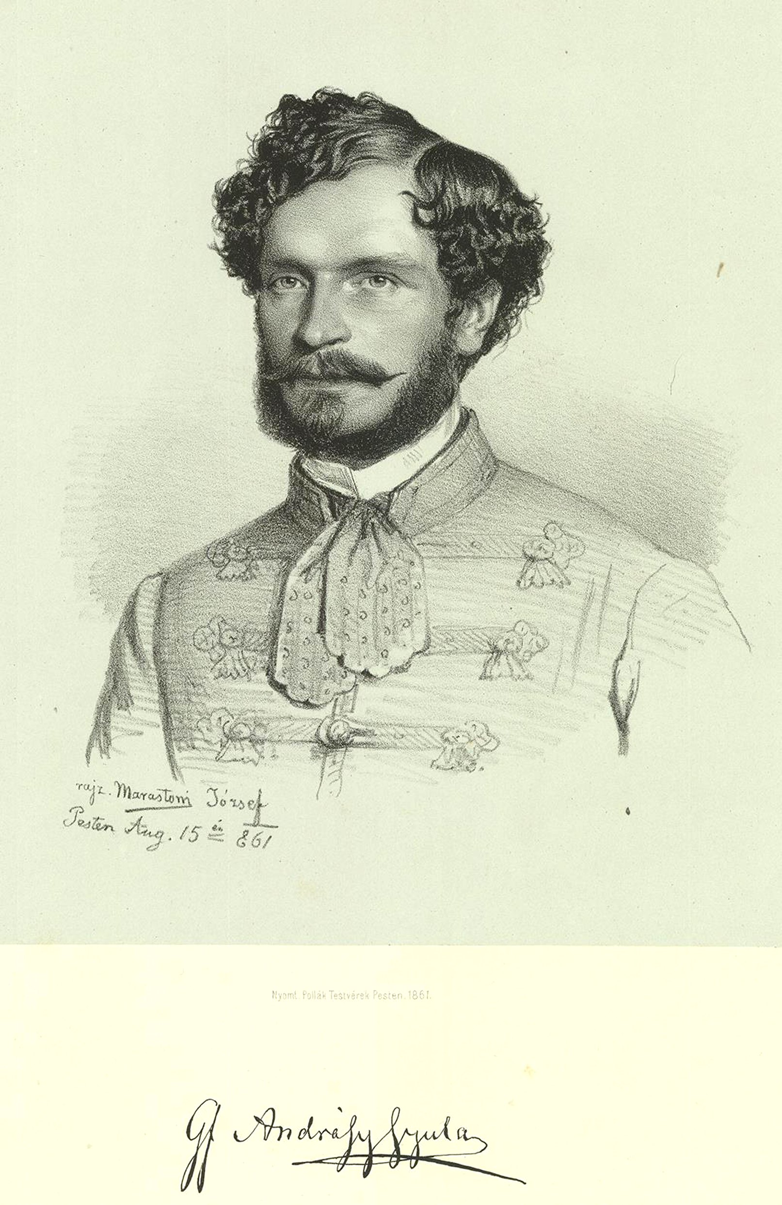 Idősebb csíkszentkirályi és krasznahorkai gróf Andrássy Gyula (Kassa, 1823. március 3. – Volosca (Fiume mellett),[2] 1890. február 18.); magyar politikus, államférfi, 1867–71-ig a Magyar Királyság miniszterelnöke, 1871–79-ig az Osztrák–Magyar Monarchia külügyminisztere, ifj. Andrássy Gyula apja.